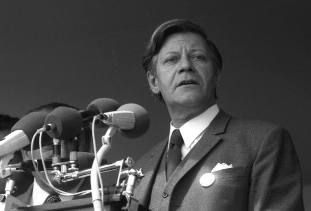 Mai-Kundgebung des DGB auf dem Königsplatz in München (Redner: Helmut Schmidt)